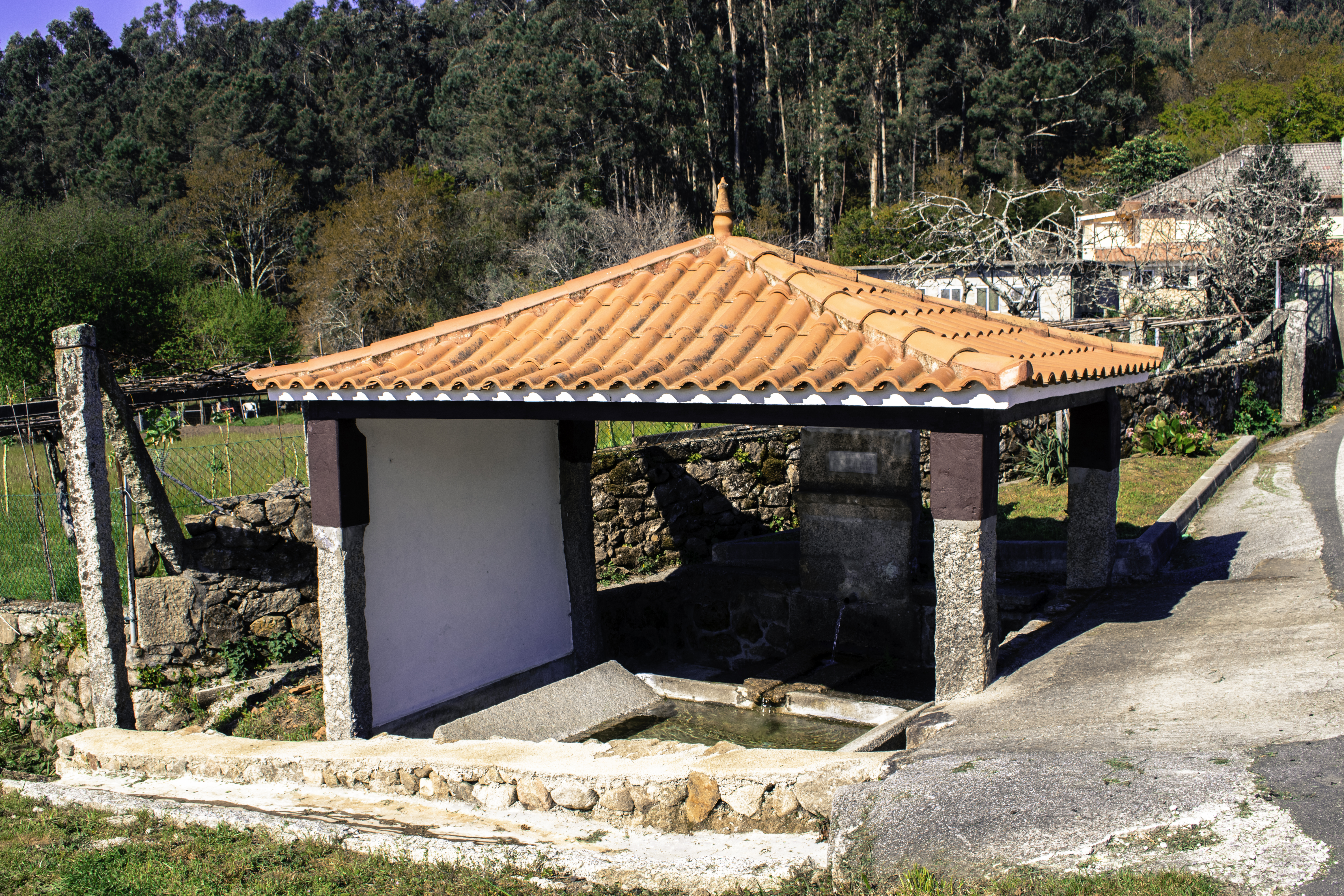 Lavadoiro de Soutonovo en Campañó, Pontevedra.